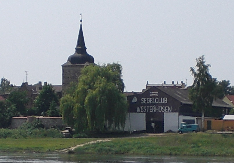 Blick über die Elbe auf den Bootsschuppen des Segelclub Westerhüsen, links St. Stephanus Kirche